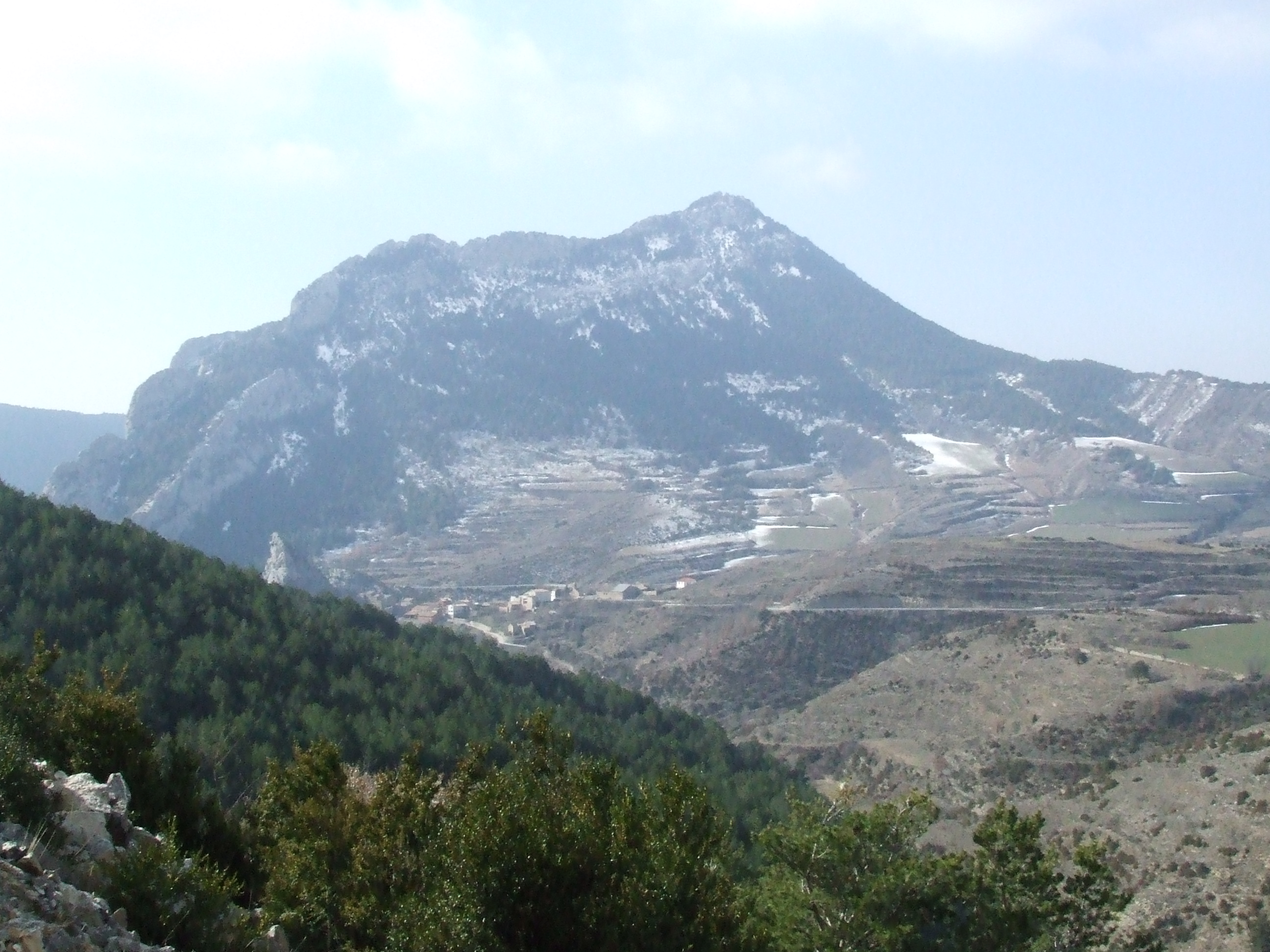 La Serra de Carrànima, costat de Bóixols (Abella de la Conca, Pallars Jussà)